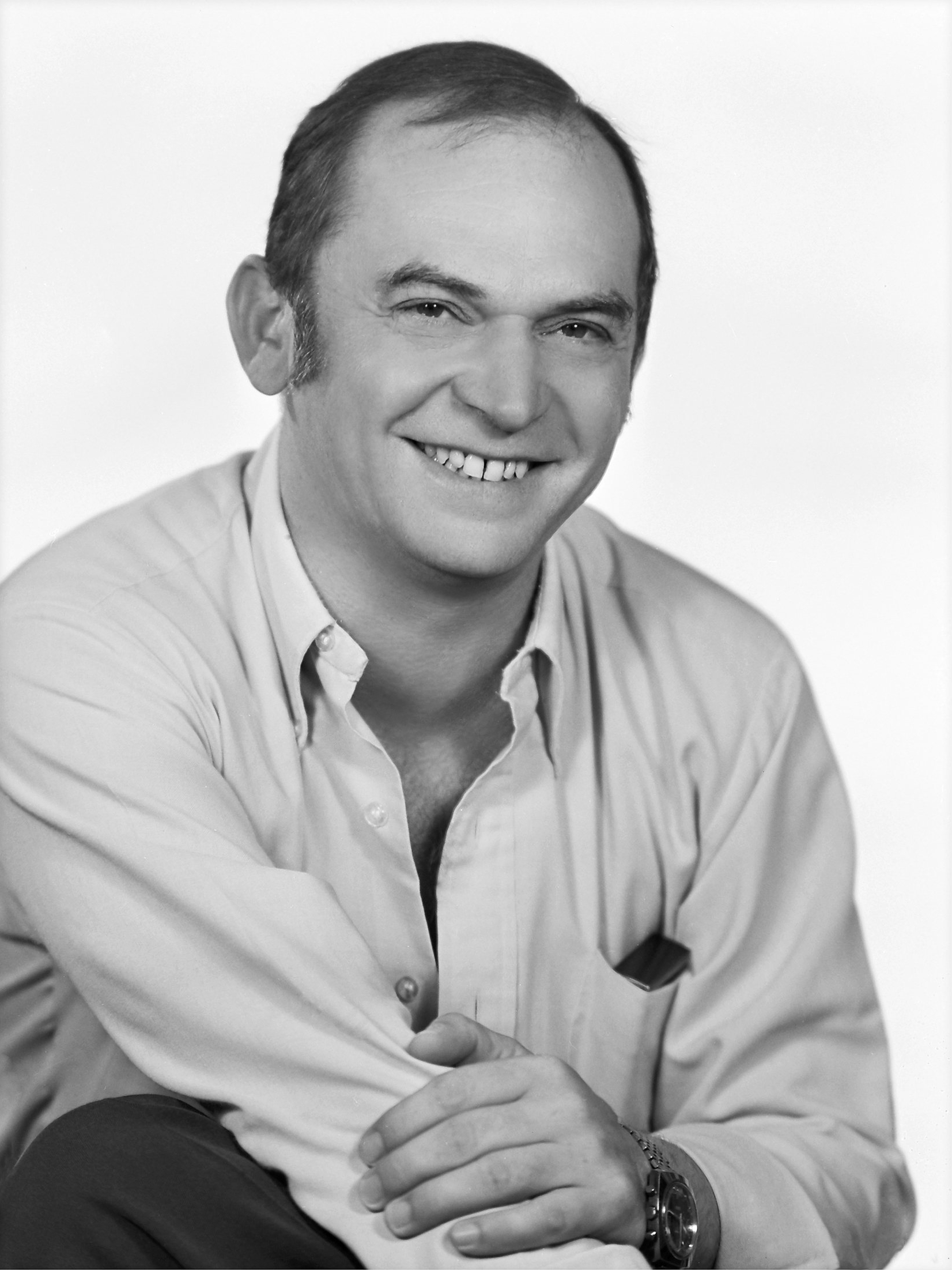 Bodrogi Gyula magyar színművész, rendező.